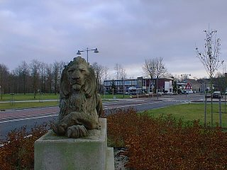 Bij de dorpsingang bevinden zich twee betonnen leeuwen die de ingang bewaken. Eigen werk.